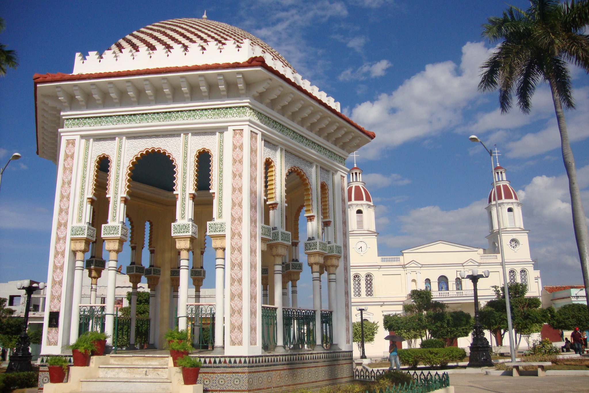 Es el símbolo de la ciudad y se levanta justamente en el centro histórico de la ciudad, en el Parque Principal de Manzanillo, al Oriente de Cuba